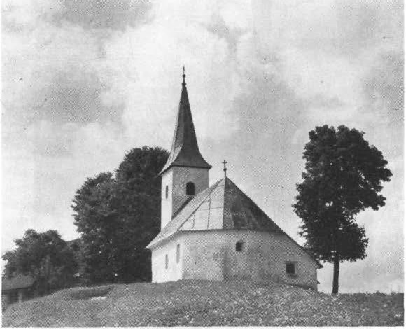 Sv. Primož na Osredku.